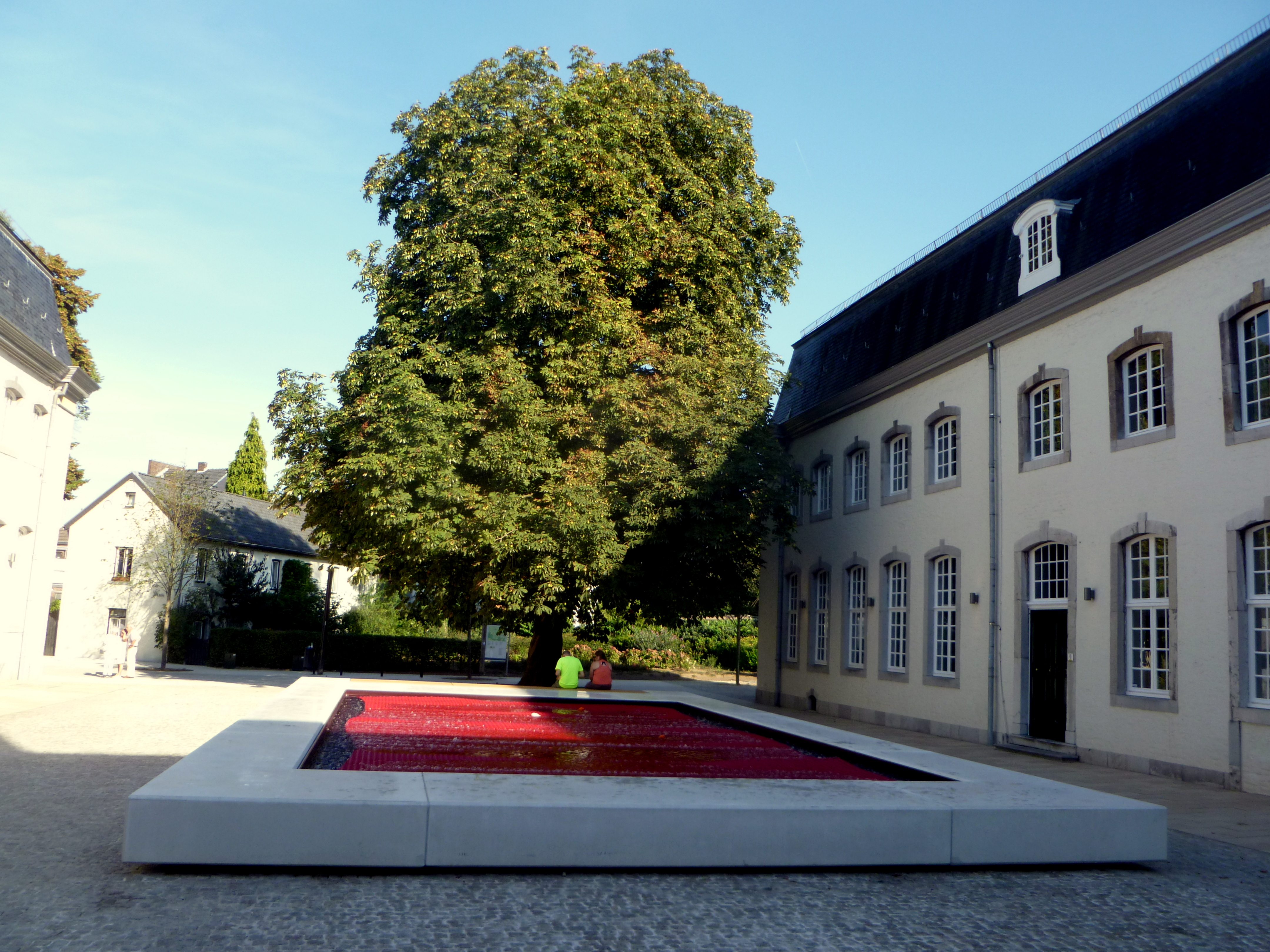 neugestalteter Innenhof des Huis Clermont in Vaals: Färberbecken